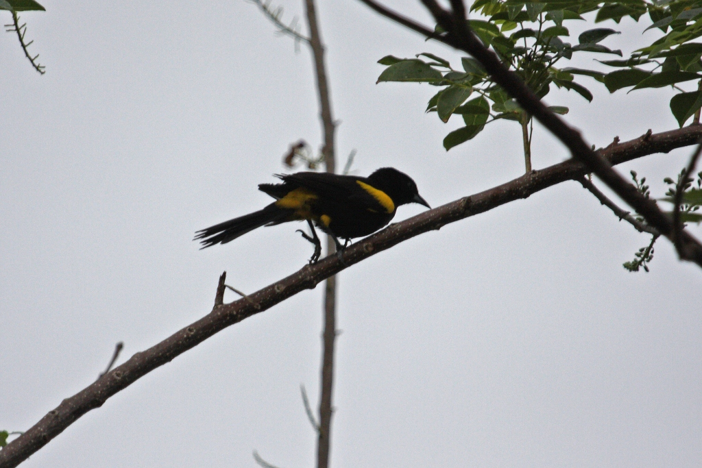 Alejandro de Humboldt National Park.